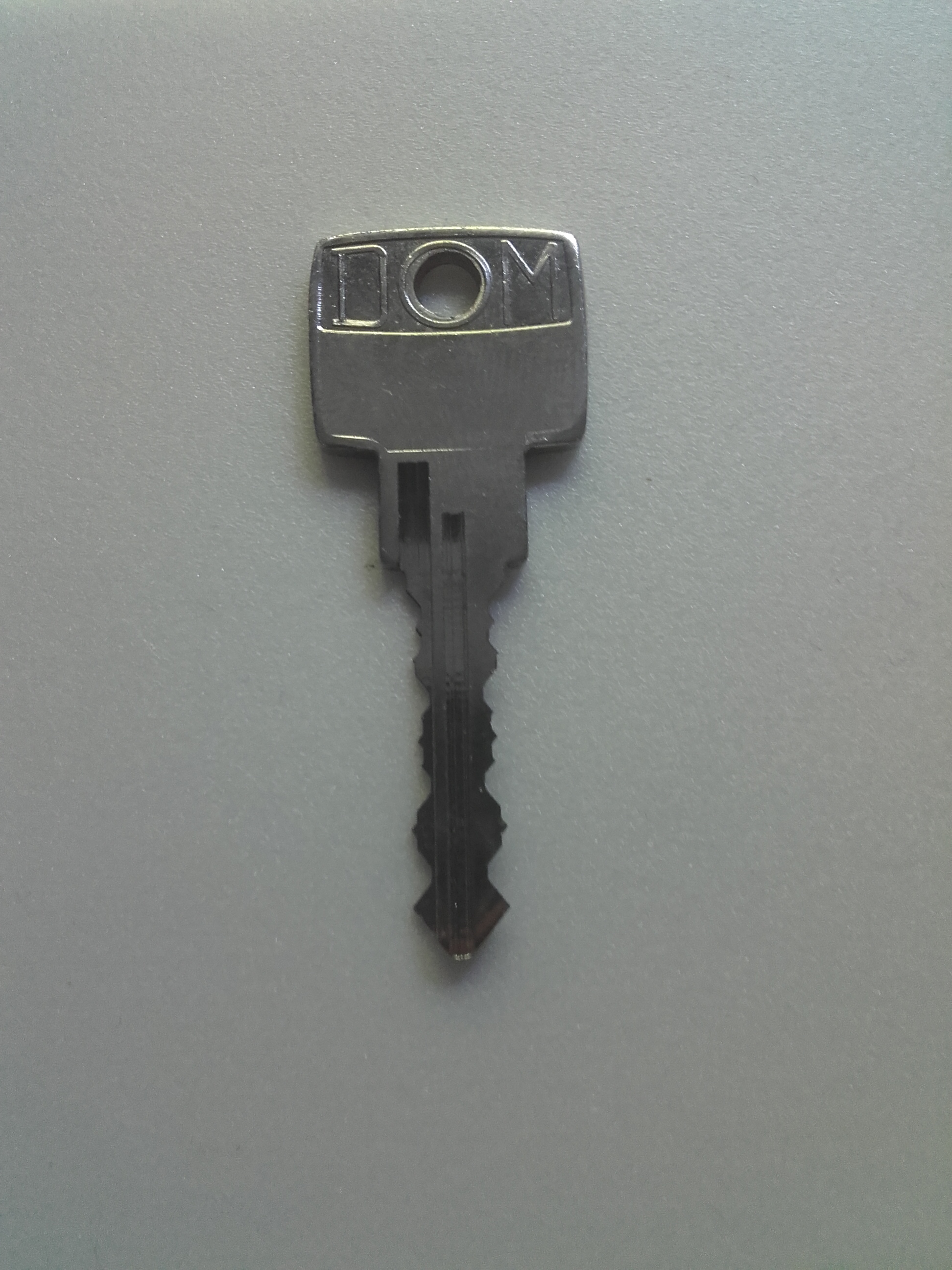 DOM-Schlüssel eines Schließfaches